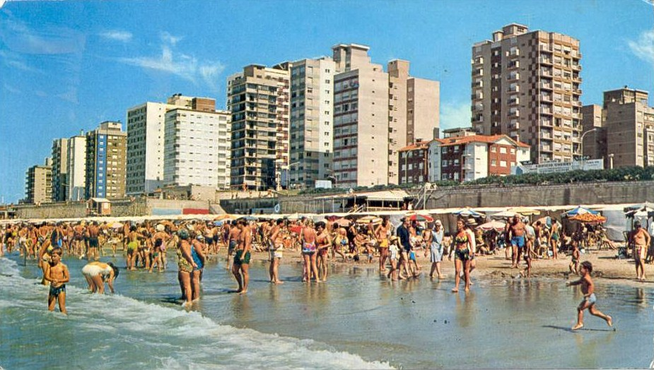 Vista de la playa de la ciudad de Miramar en Argentina, en la década de 1970. Se ven los edificios de veraneo construidos en la Avenida 2.